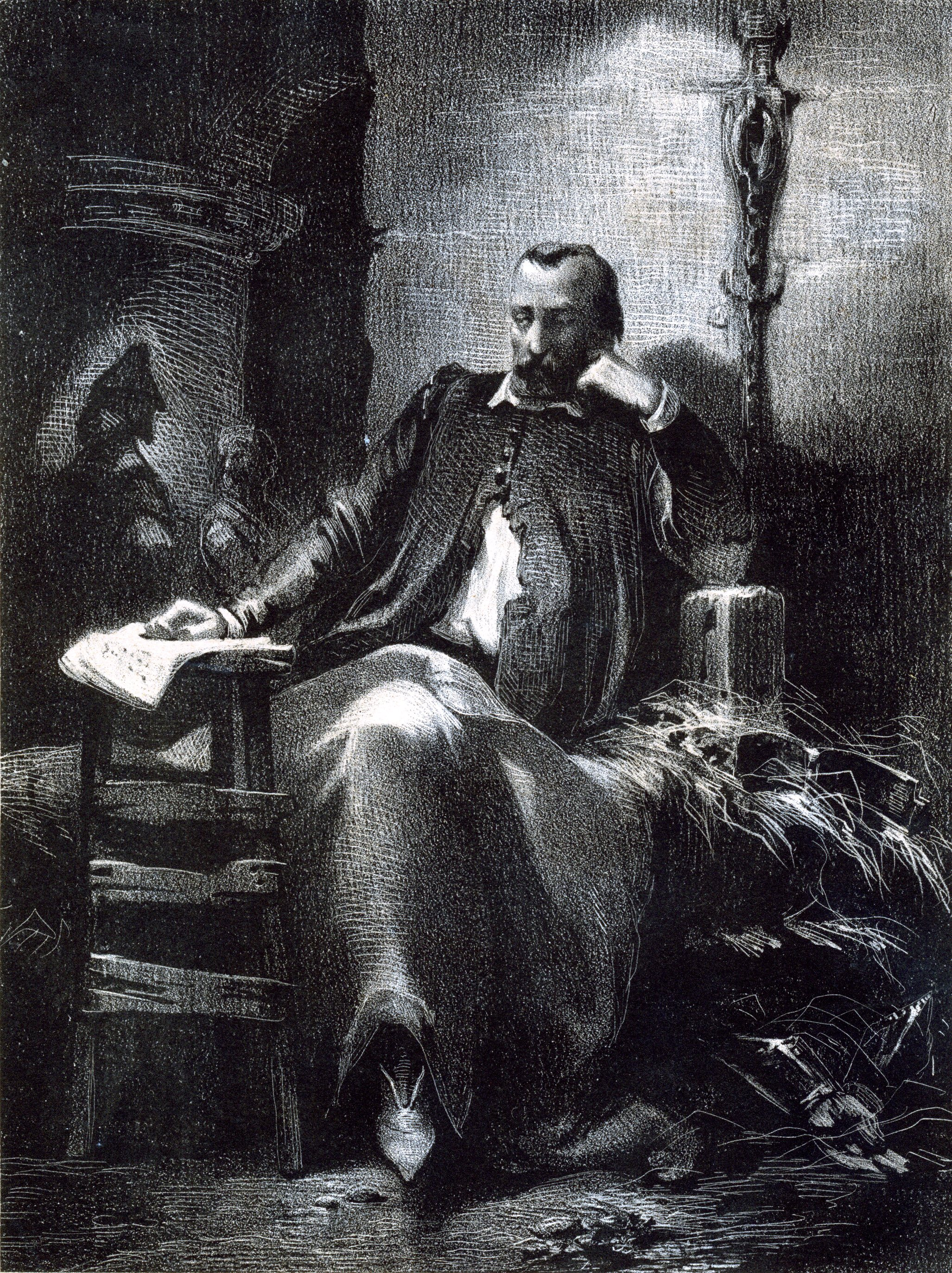 lithographie de Moreaux dans la revue l'Artiste